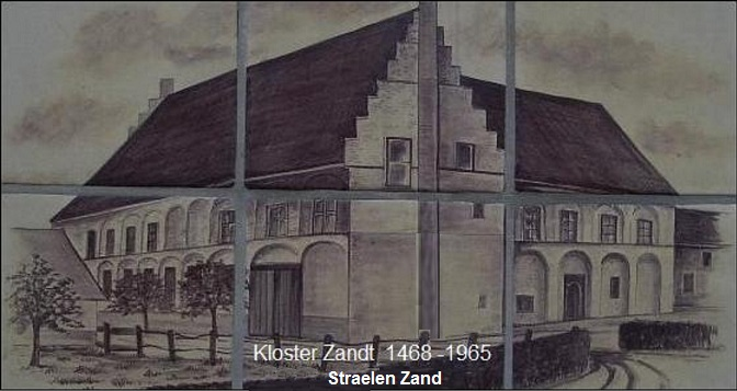 Kachelansicht des ehemaligen Klosters Zandt in Straelen Niederrhein